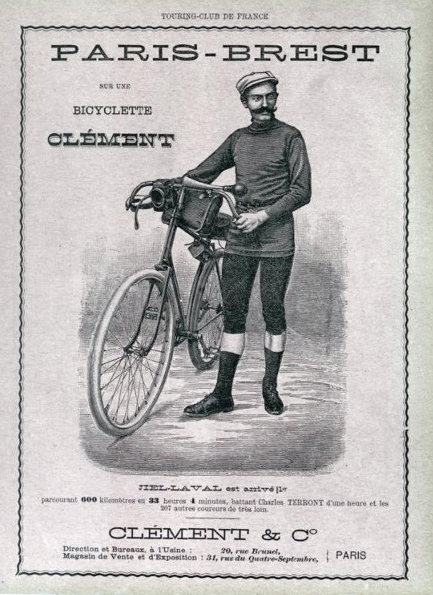 Joseph Jiel-Laval en 1891, publicité Cycles Clément de décembre 1892.